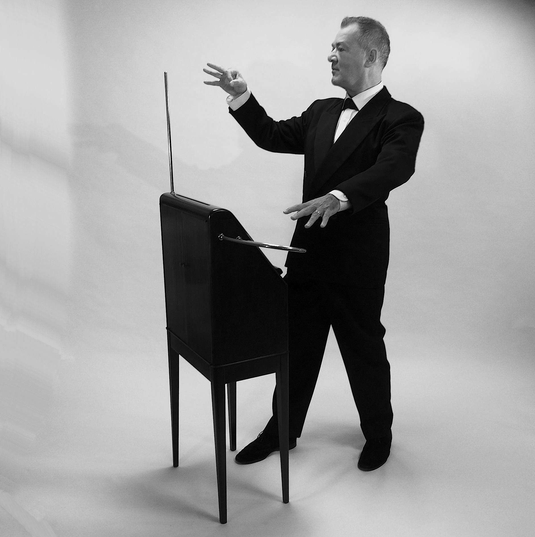 Bruce Woolley avec RCA Victor Theremin 2014